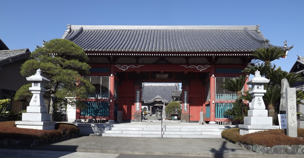 井戸寺の仁王門